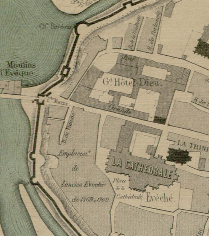 Plan de 1755 de Chalons. provenance : « Collection de la Bibliothèque Georges Pompidou de Châlons-en-Champagne » et la cote du document : ES PL MOD CHA 7 (17602-1).